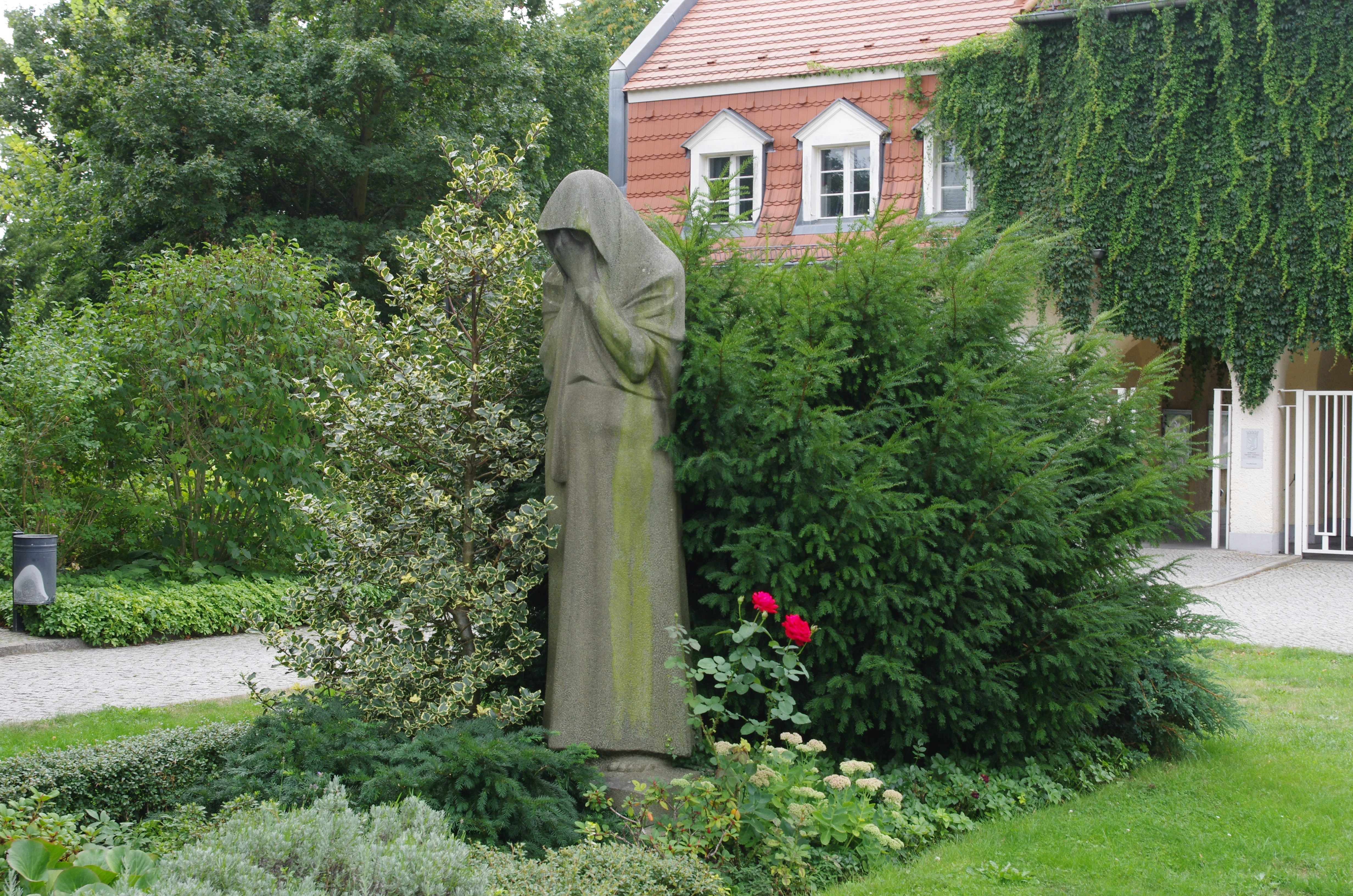 Baumschulenweg in Berlin. Der Friedhof steht unter Denkmalschutz. Hier die Figur die Trauernde.